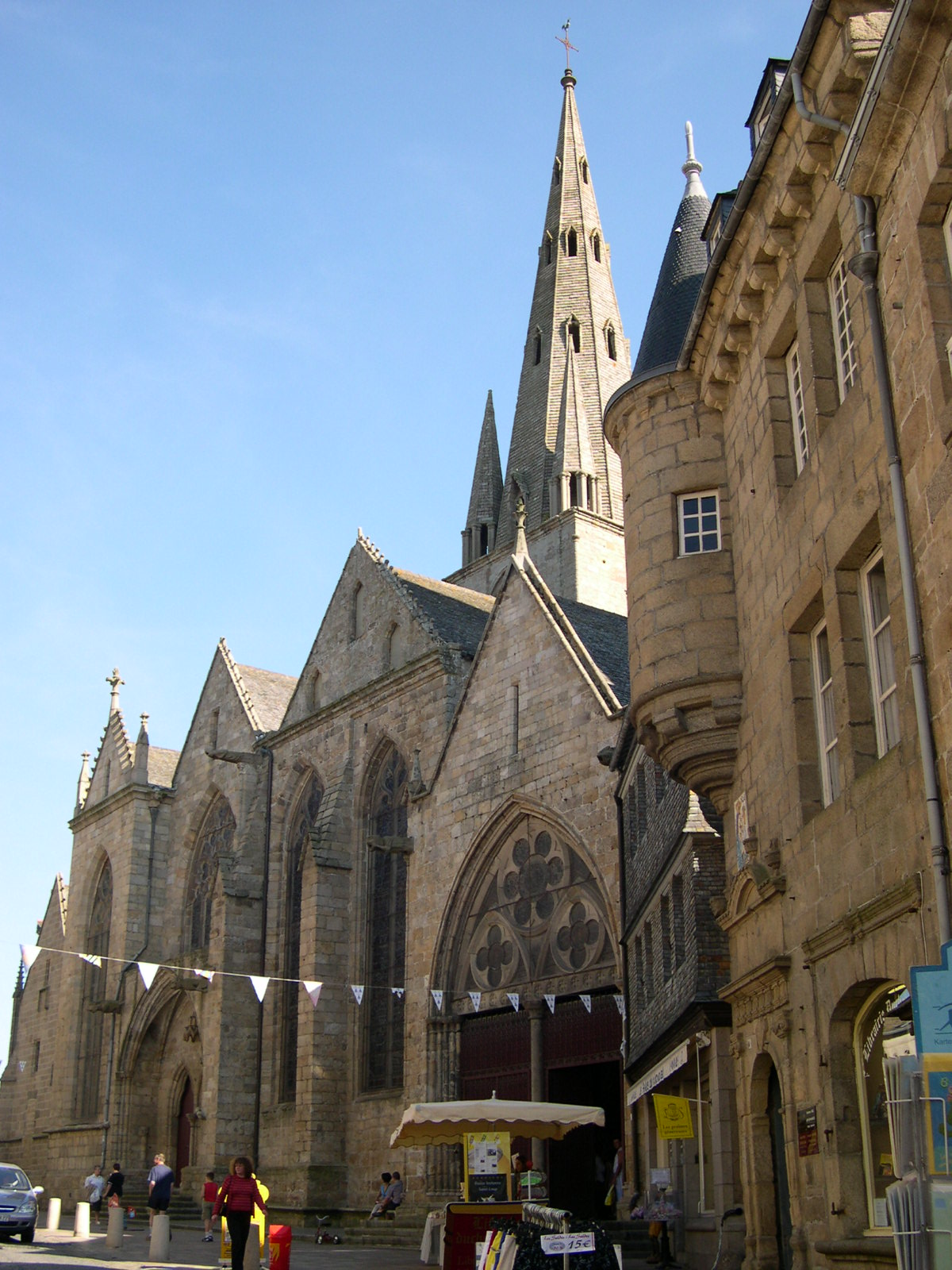 Flanc nord de la basilique Notre-Dame de Bon-Secours de Guingamp - Côtes-d'Armor - France .